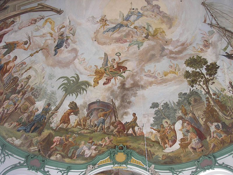 Pfarrkirche St. Vitus (Egling an der Paar, Landkreis Landsberg am Lech, Oberbayern). Der Ostteil des Langhausfreskos. Eigene Aufnahme, Okt. 2006 / Parish church St. Vitus (Egling an der Paar, Upper Bavaria, Germany). The nave. Eastern part of the great fresco. Own photo, Oct. 2006